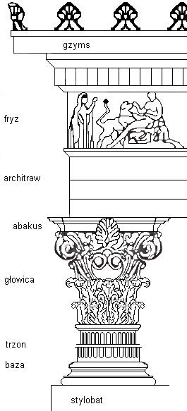 Porządek koryncki. Autor rysunku Radomil.